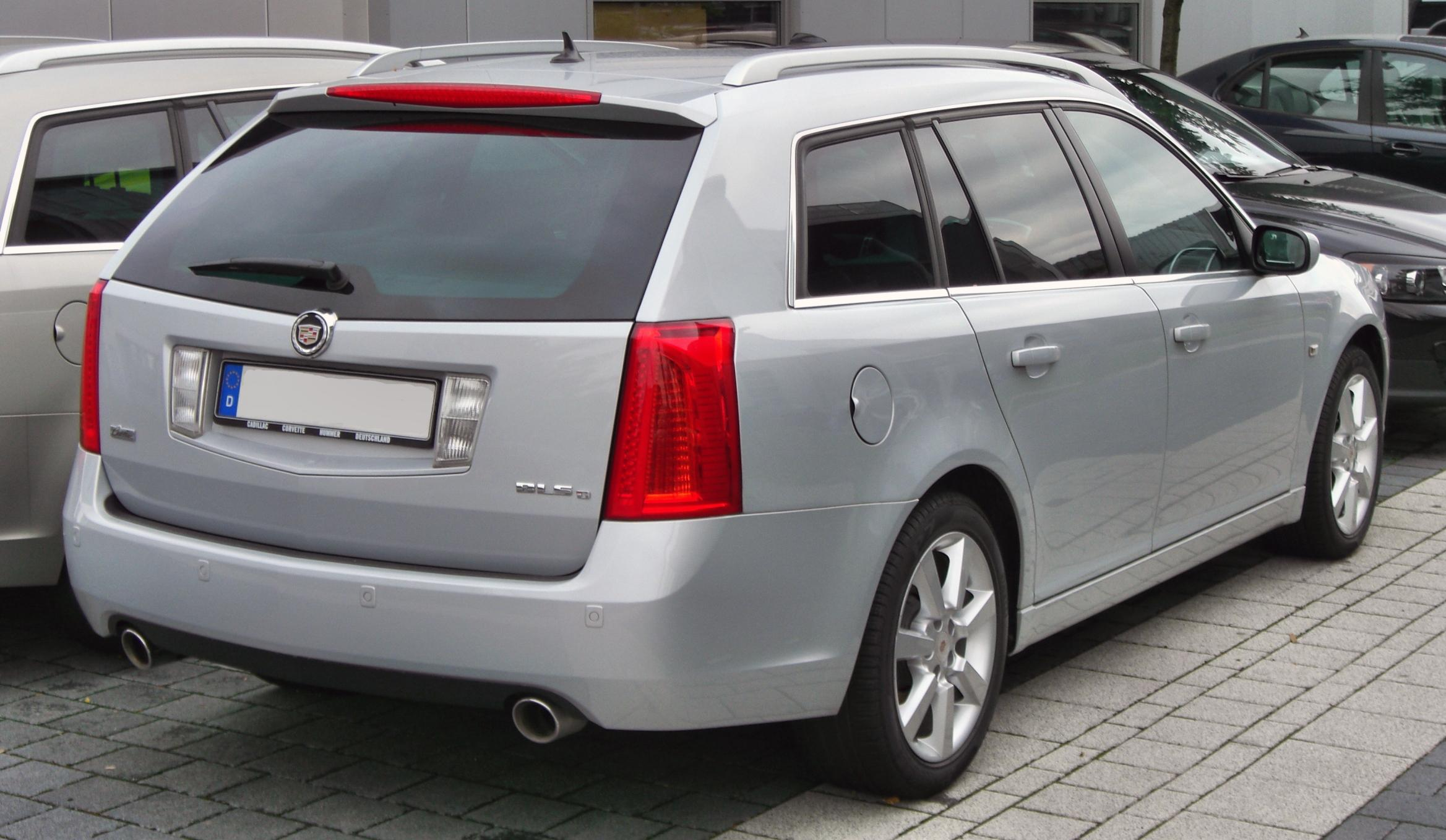 Cadillac BLS Wagon